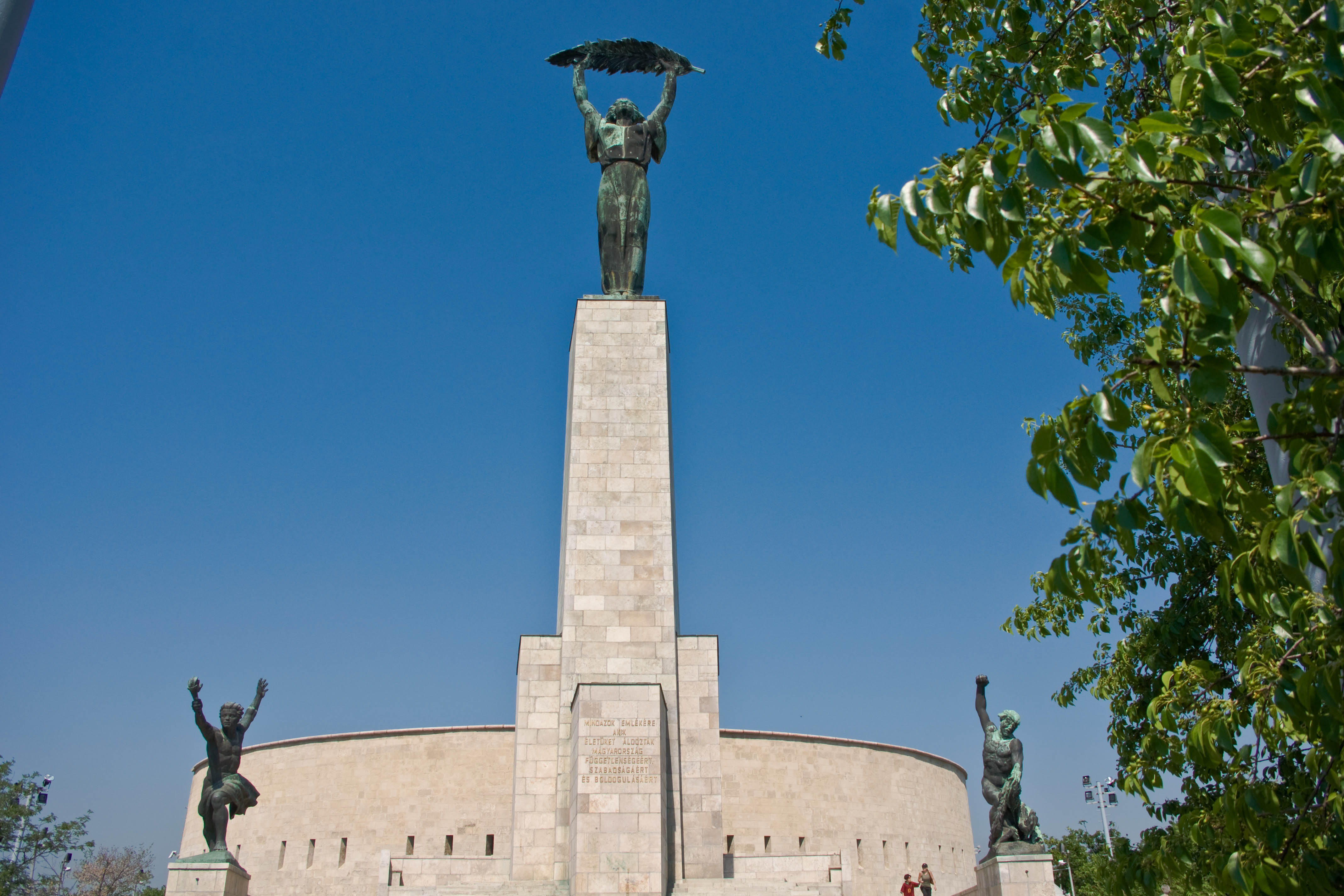 Вид на памятник свободы с обзорно площадки на горе Гелерт